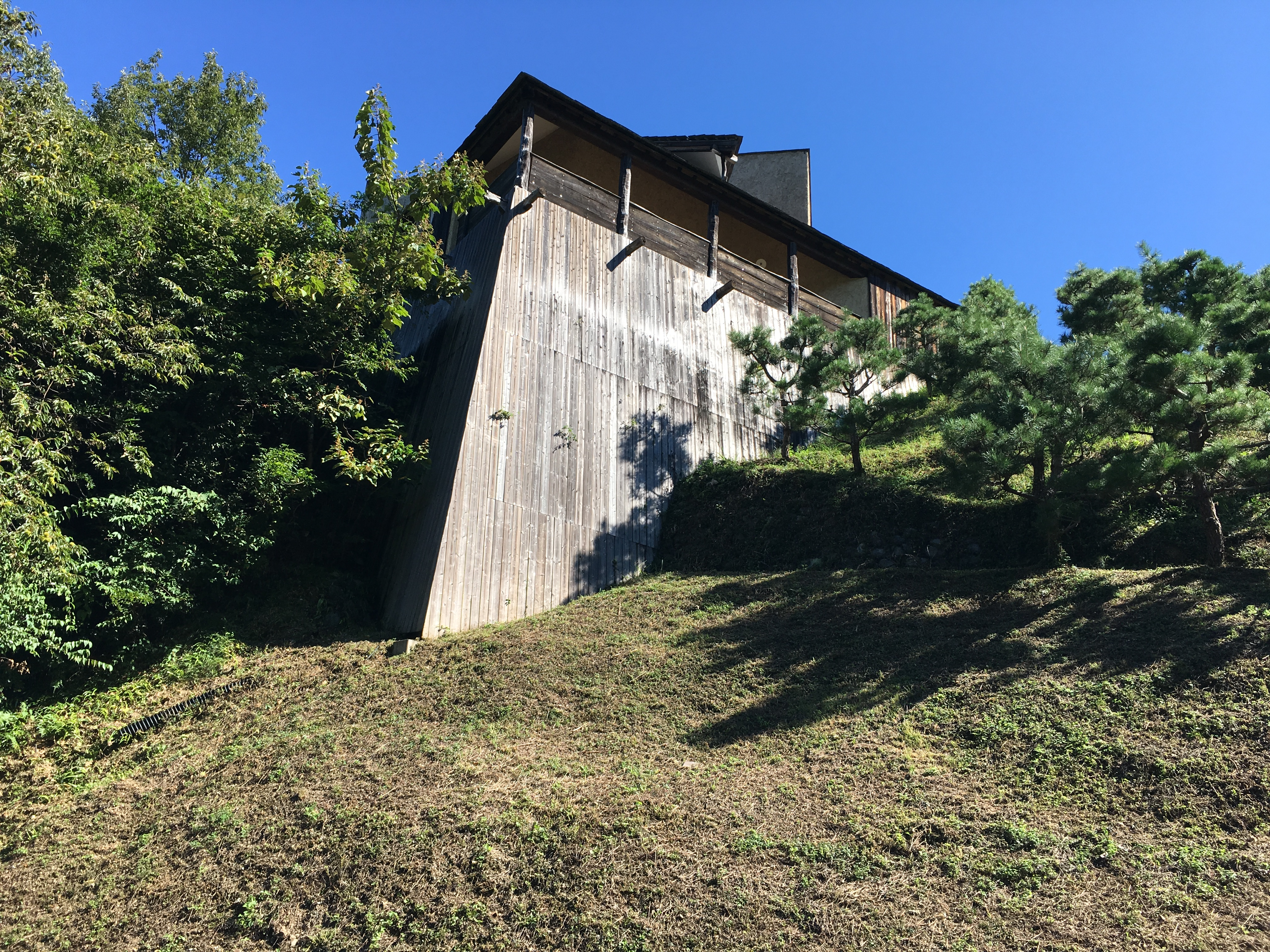 浜松市秋野不矩美術館（静岡県浜松市）外壁部分